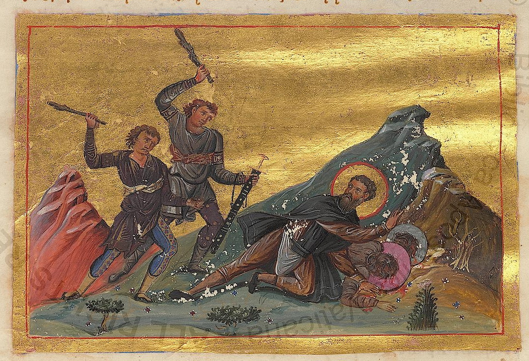 Мученичество св. Доментия Персиянина. Миниатюра из Минология Василия II. 976-1025 гг. (vat. пк. 1613. Р. 89) // Martyr Dometius of Persia and Two Disciples.